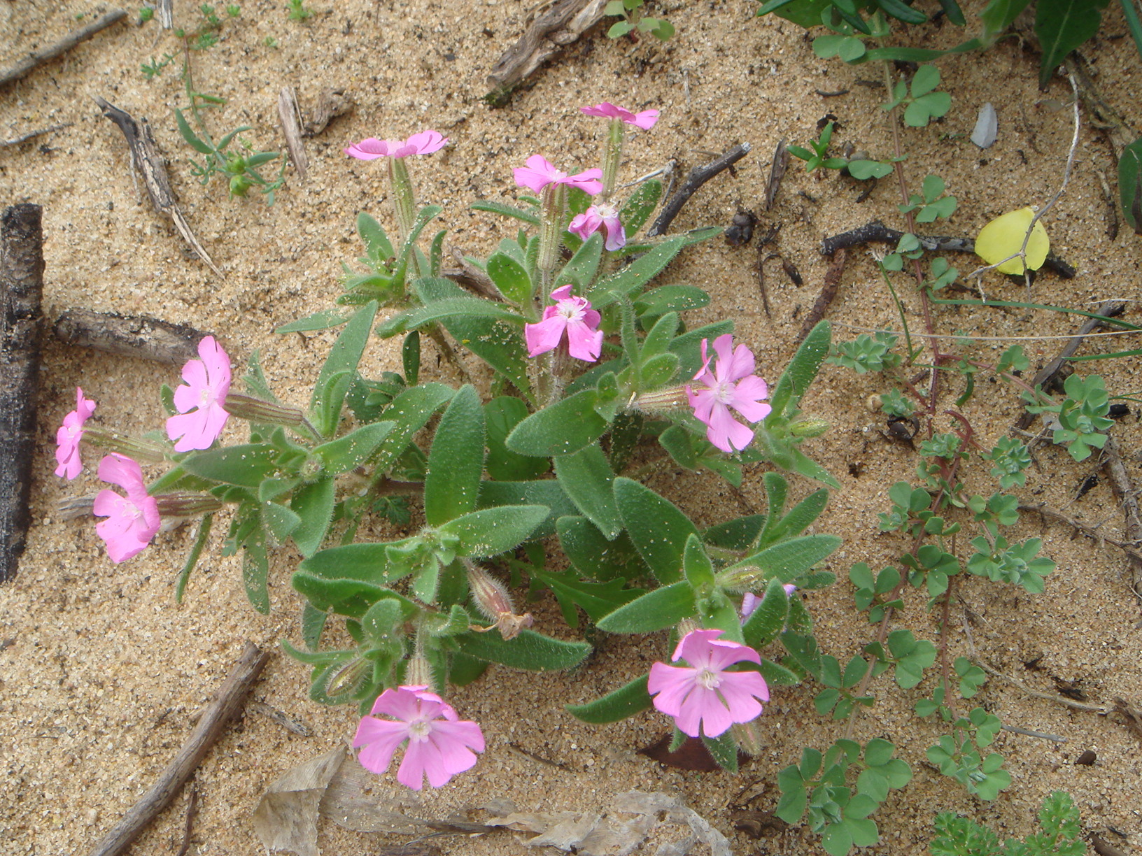 Silene littorea, Chiclana (Cádiz), España